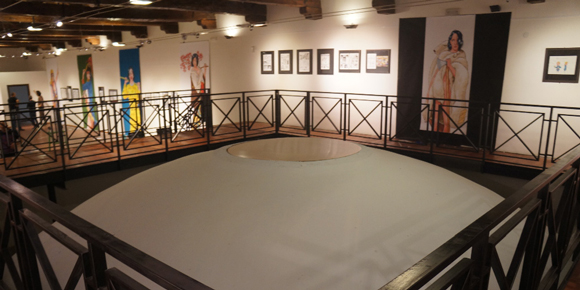 Interno del Museo del Fumetto di Cosenza